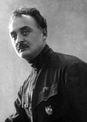 Гегечкори, Алексей Александрович